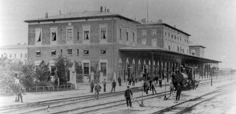 Empfangsgebäude des Bahnhofs Simbach kurz nach der Eröffnung von der Gleisseite. Auf Gleis 2 steht eine Schlepptenderlokomotive.